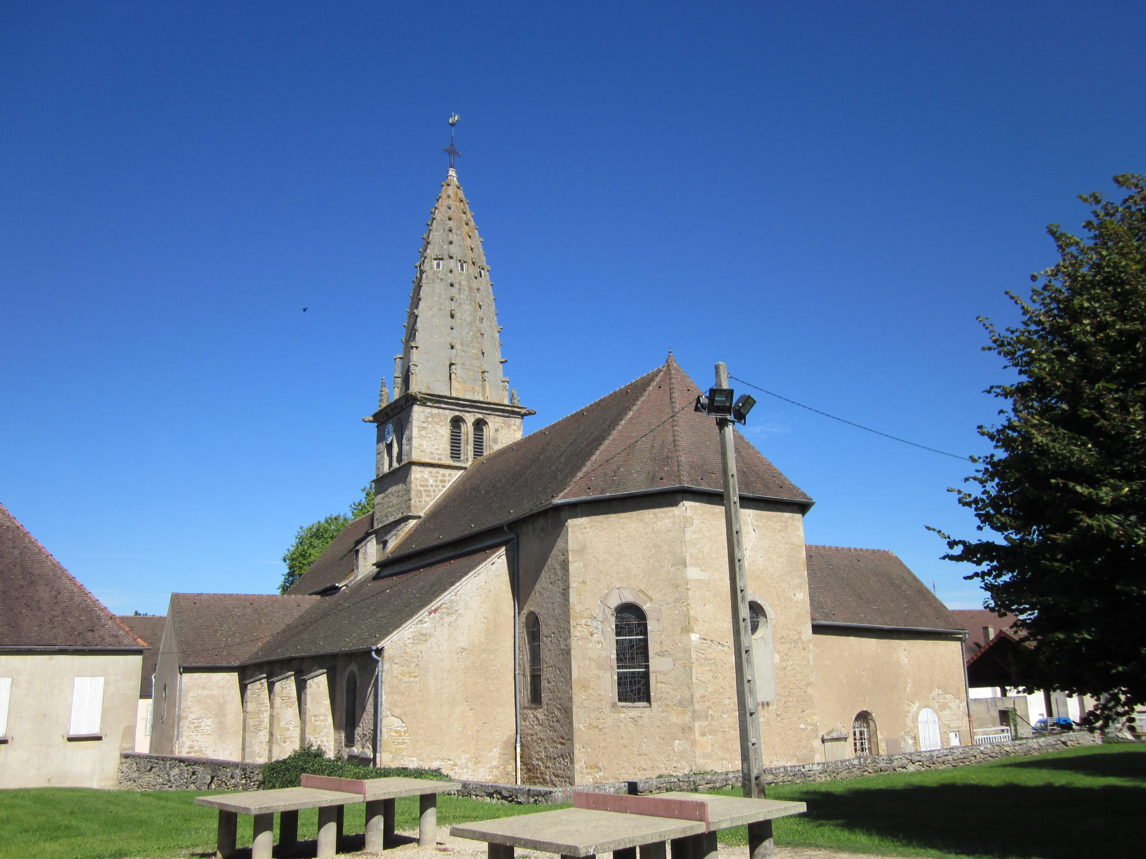 Saint-Léger-sur-Dheune - église romane du XIIe s. et clocher du XVe s.